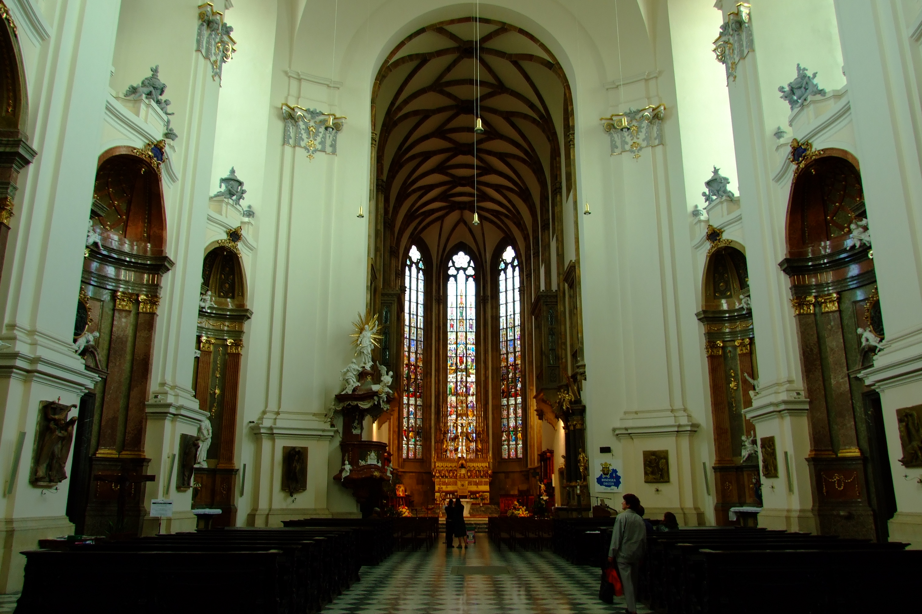 Petrov - interiér katedrály